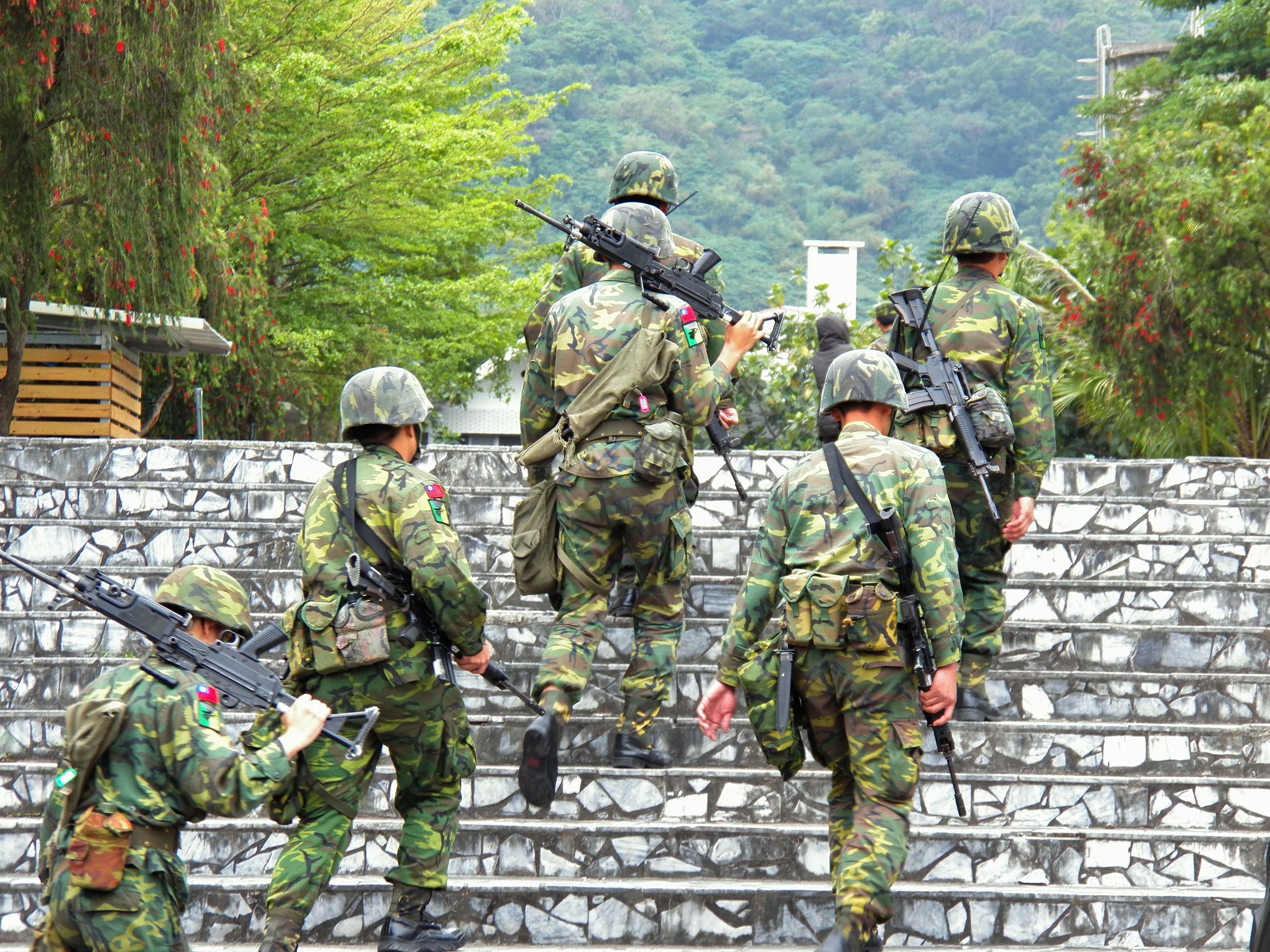 2012年陸軍臺東地區指揮部營區開放活動，作戰演練結束後，全副武裝、手持槍械的士兵登階歸營。